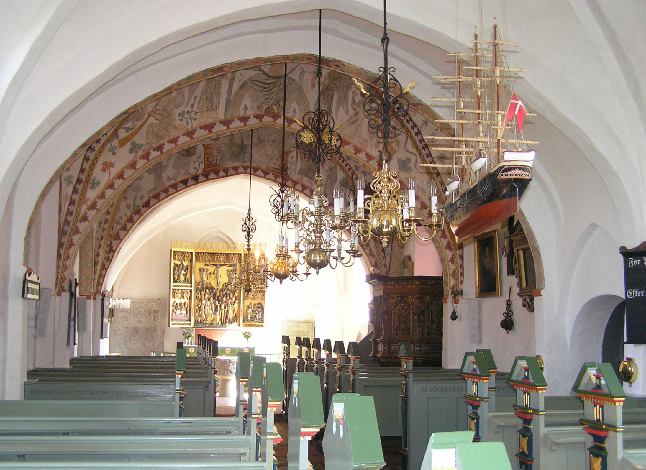 ’Georg Stage’ blev i 1946 ophængt i Birkerød Kirke i skibets vestfag. ’Georg Stage’ er udført af malermester Johannes Engstrøm, Birkerød